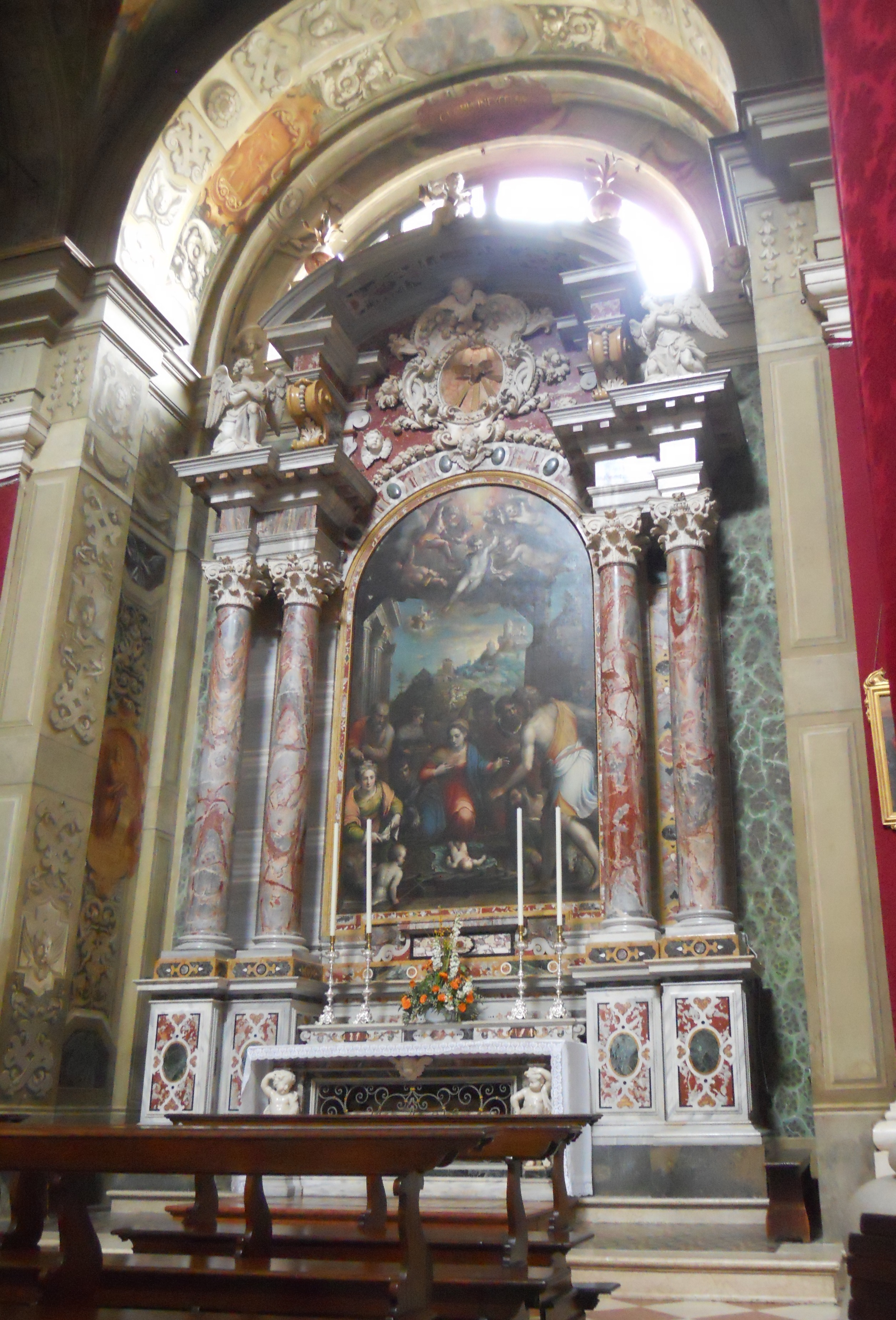 San Faustino maggiore (Brescia) (altare della natività)